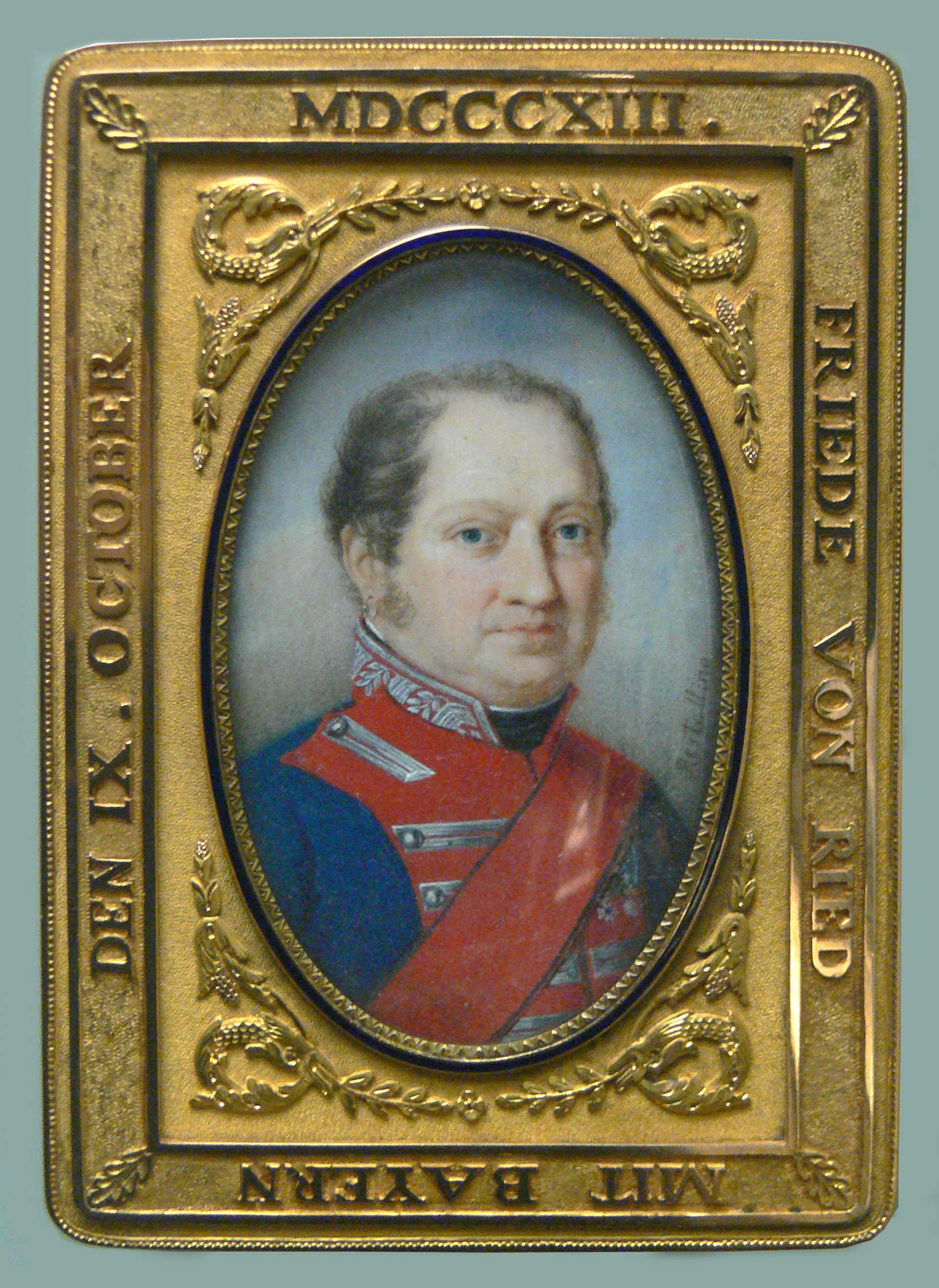 Tabatière mit dem Bildnis Max I. Joseph von Bayern, aus Anlass des Vertrags von Ried 1813